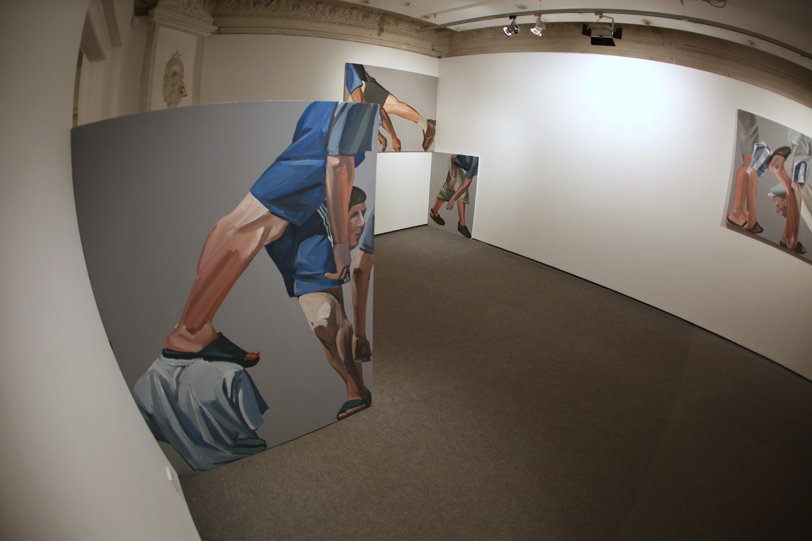 Леся Хоменко "Змішані почуття", 2013